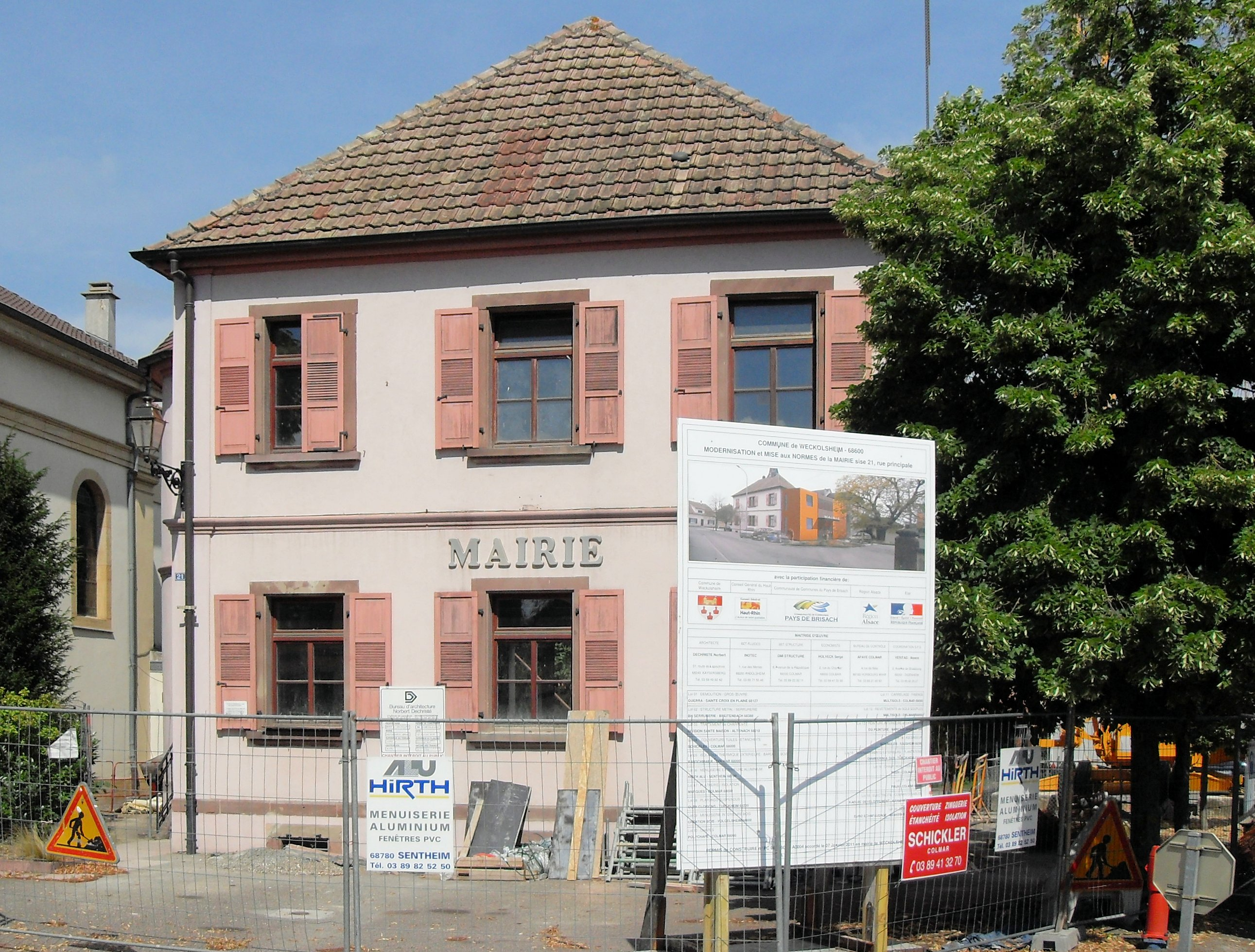 La mairie de Weckolsheim (Reconstruction à la mi 2011)